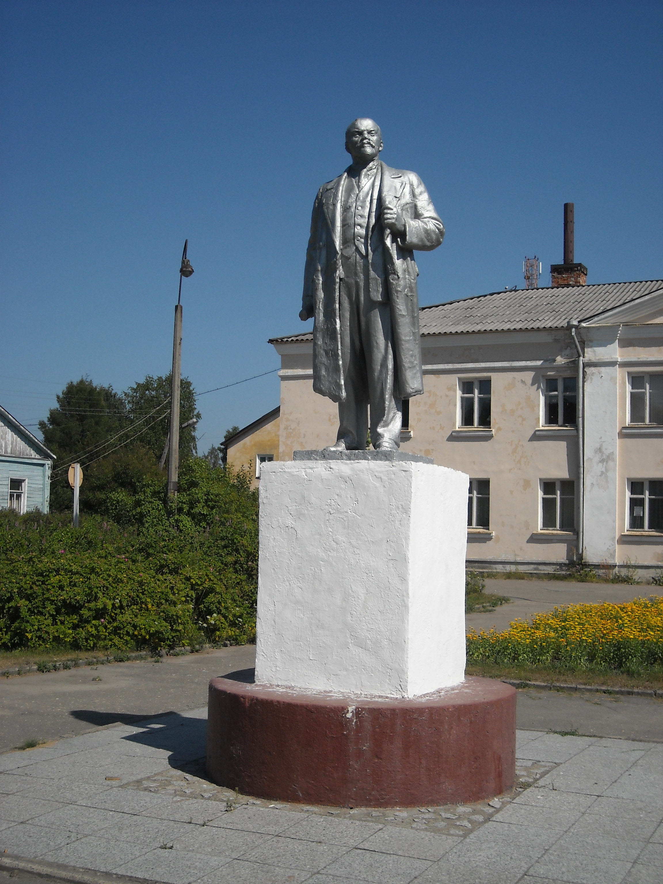 Памятник В. И. Ленину в центре Пудожа.